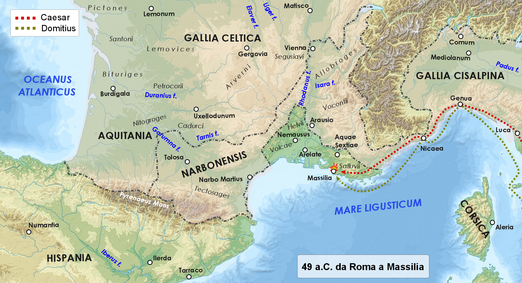 Cesare una volta tornato a Roma, riparte per la Spagna e lungo strada si ferma a Marsiglia che assedia poco dopo, affidandone la direzione a Gaio Trebonio (19 aprile 49 a.C.)